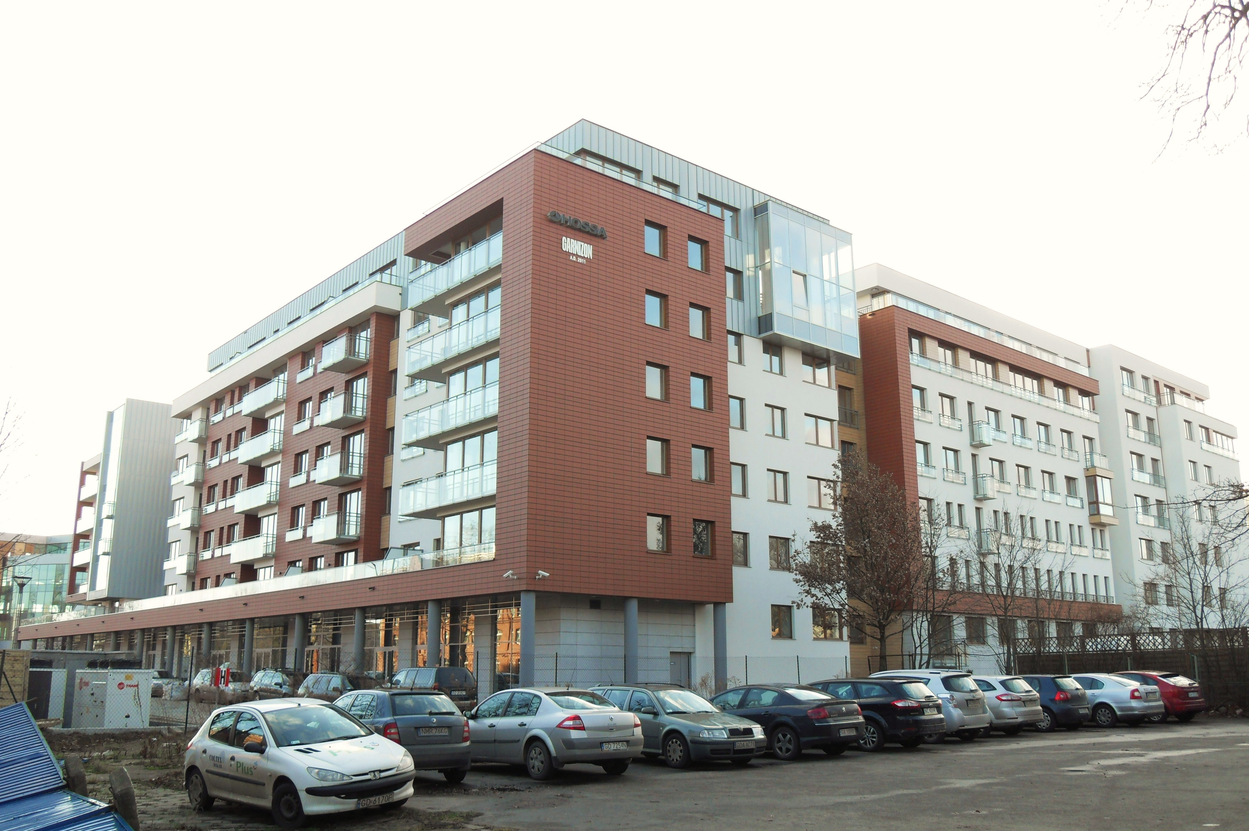 Gdańsk Wrzeszcz, osiedle "Garnizon".